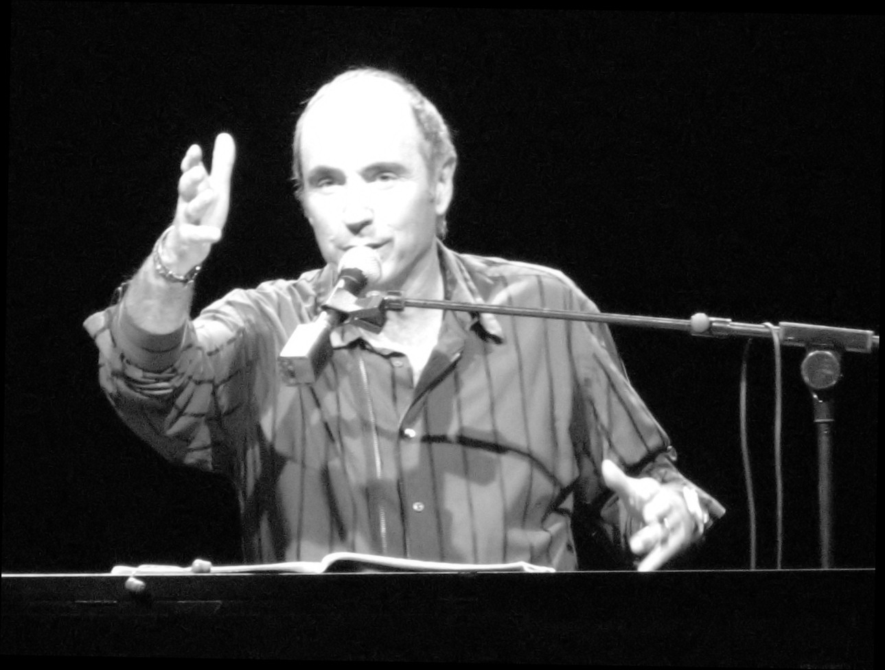 Lluís Llach a l'Olímpia (París)308972562